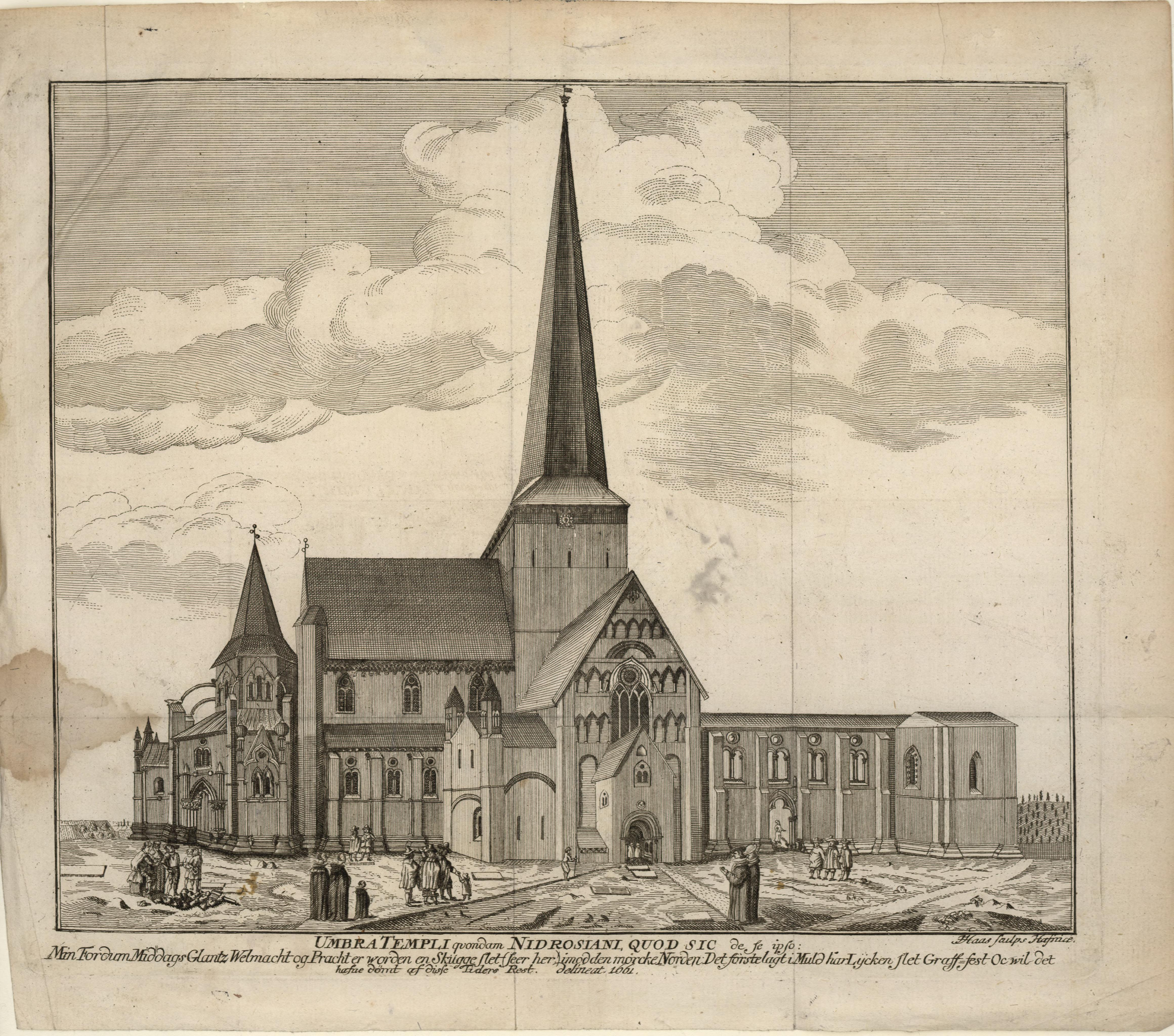 Illustrasjon hentet fra boken "Beskrivelse over den tilforn meget prægtige og vidtberømte Dom-Kirke i Throndhjem, egentligen kaldet Christ-Kirken" av Schøning, Gerhard og utgitt av Trykt hos Jens Christensen Winding (Trondheim, 1762)